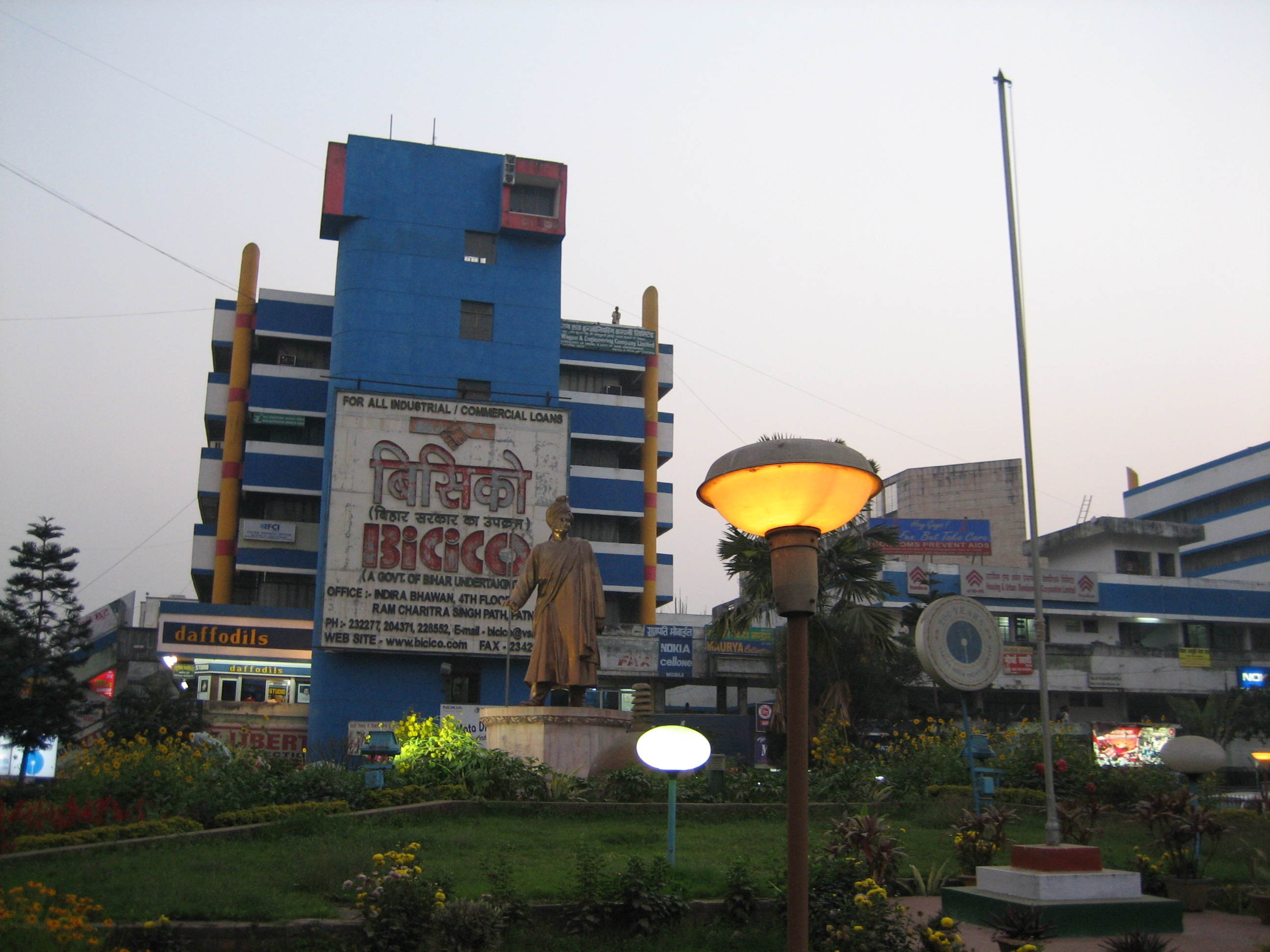 Maurya Lok Complex, Patna